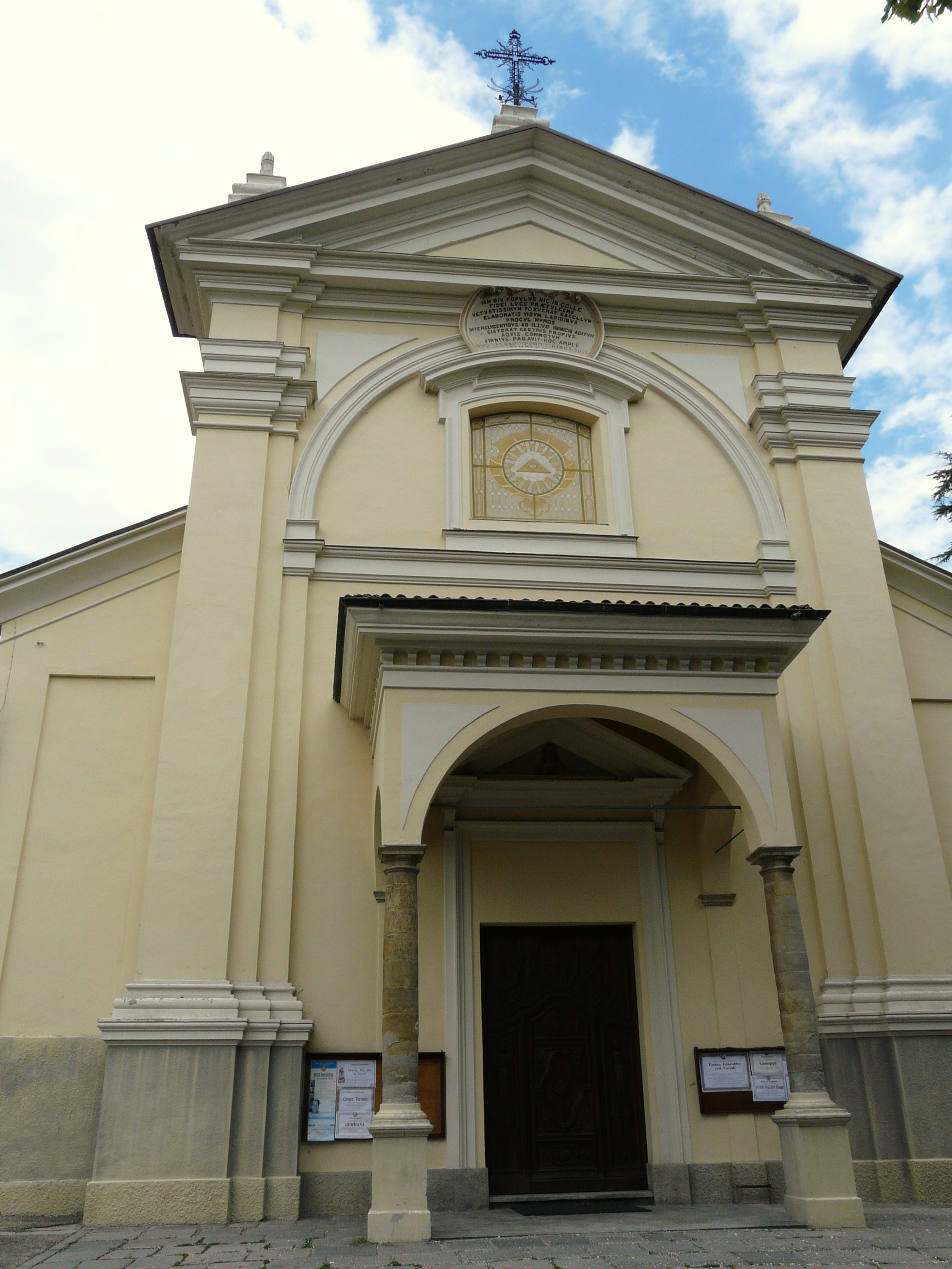 Chiesa di San Leonardo di Canelli, Piemonte, Italia